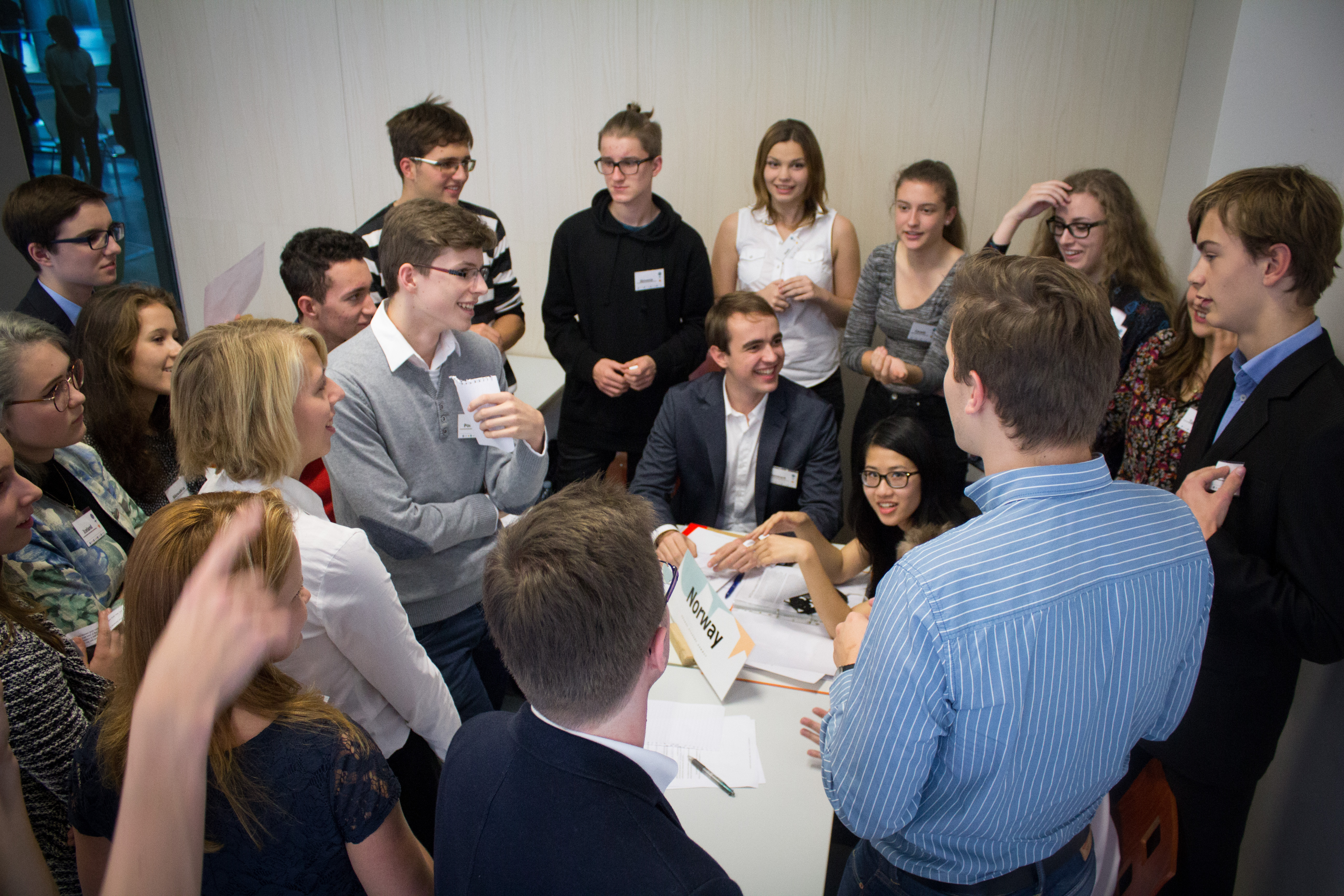 kuloární jednání